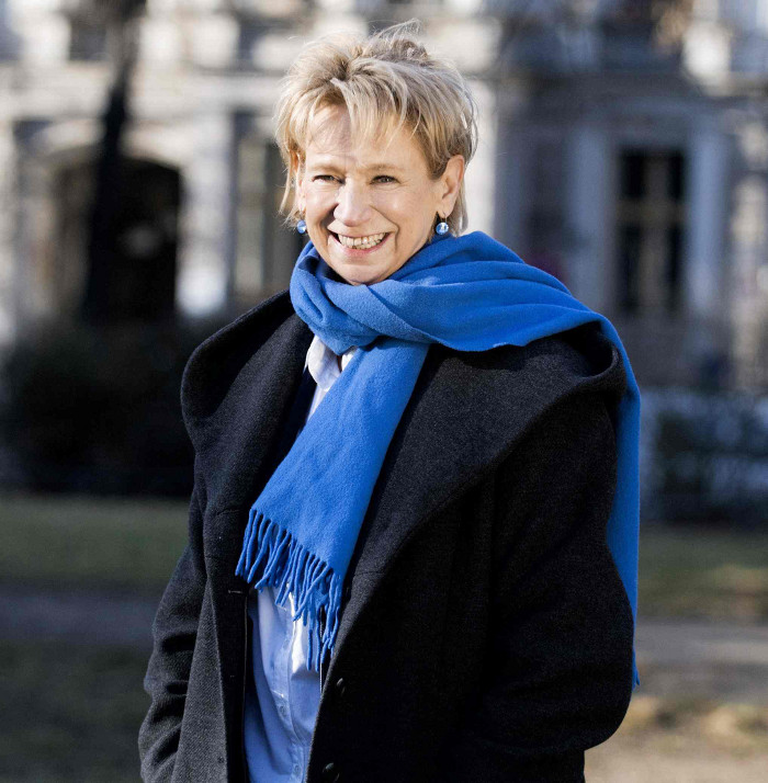 Jutta Voigt Schriftstellerin, Autorin, Journalistin Portrait 2012 © Milena Schlösser